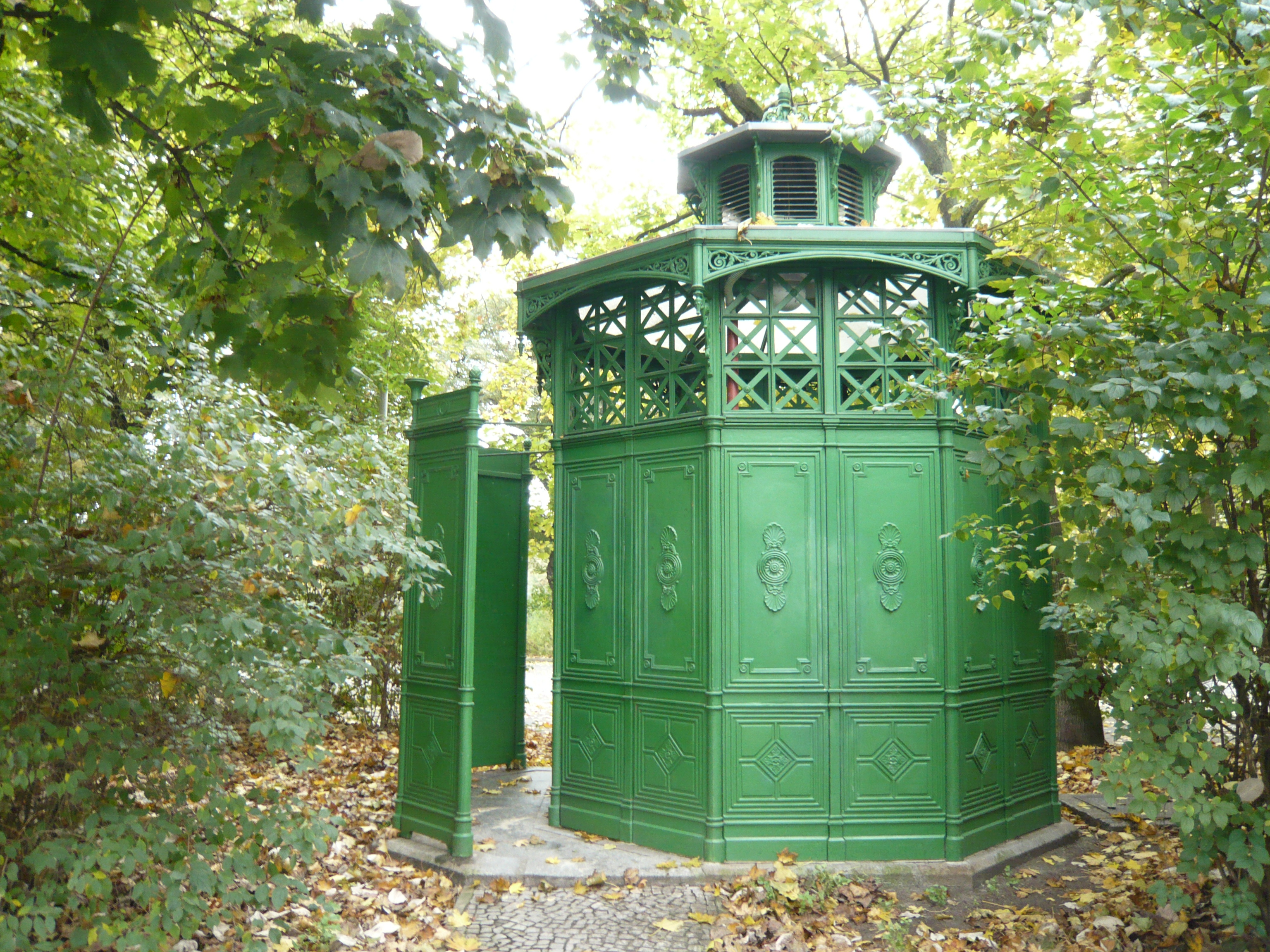 Ortsteil Berlin-Wedding/ Pekinger Platz